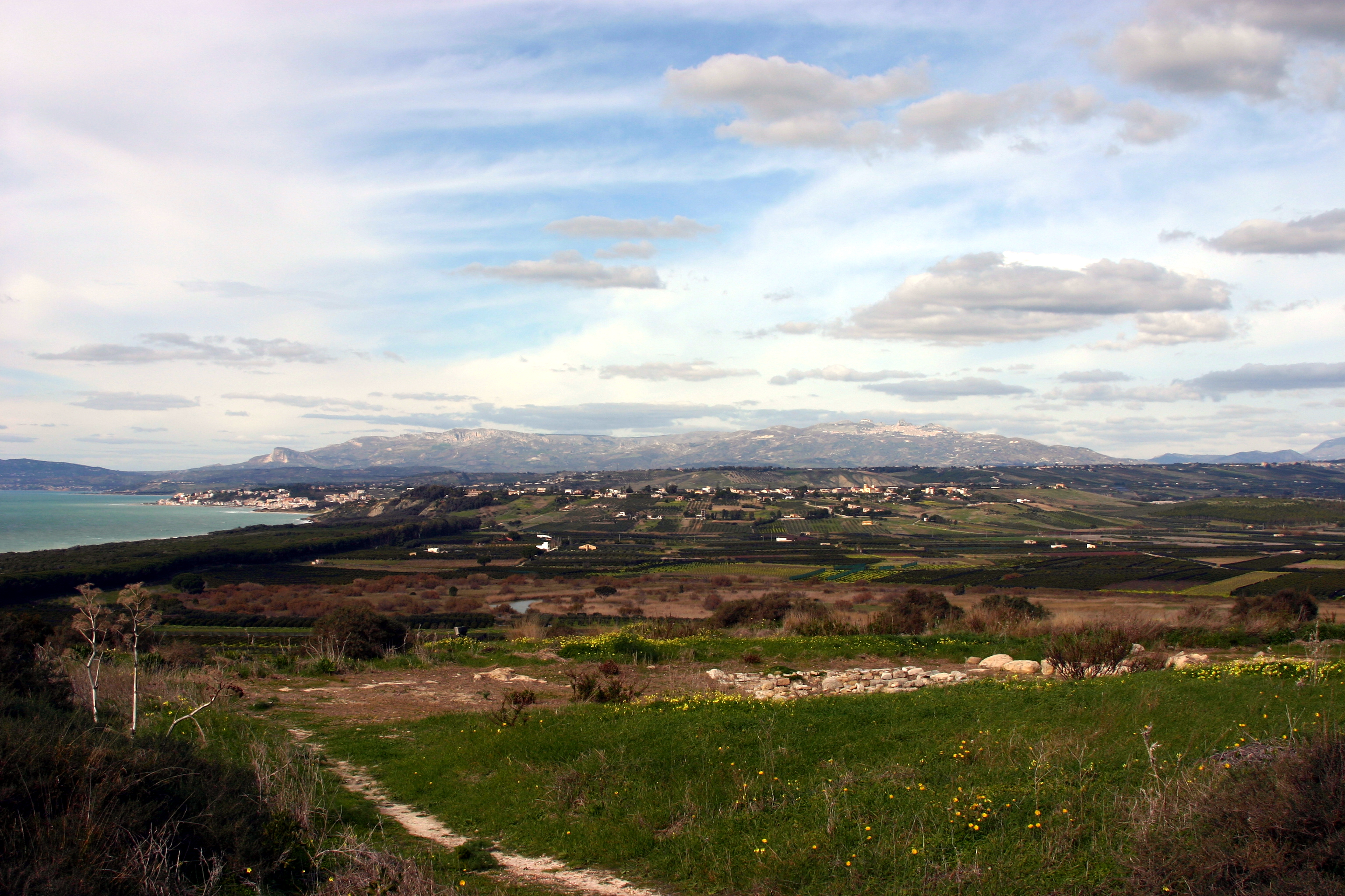 Heraclea Minoa